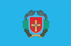 Прапор Томаківського району